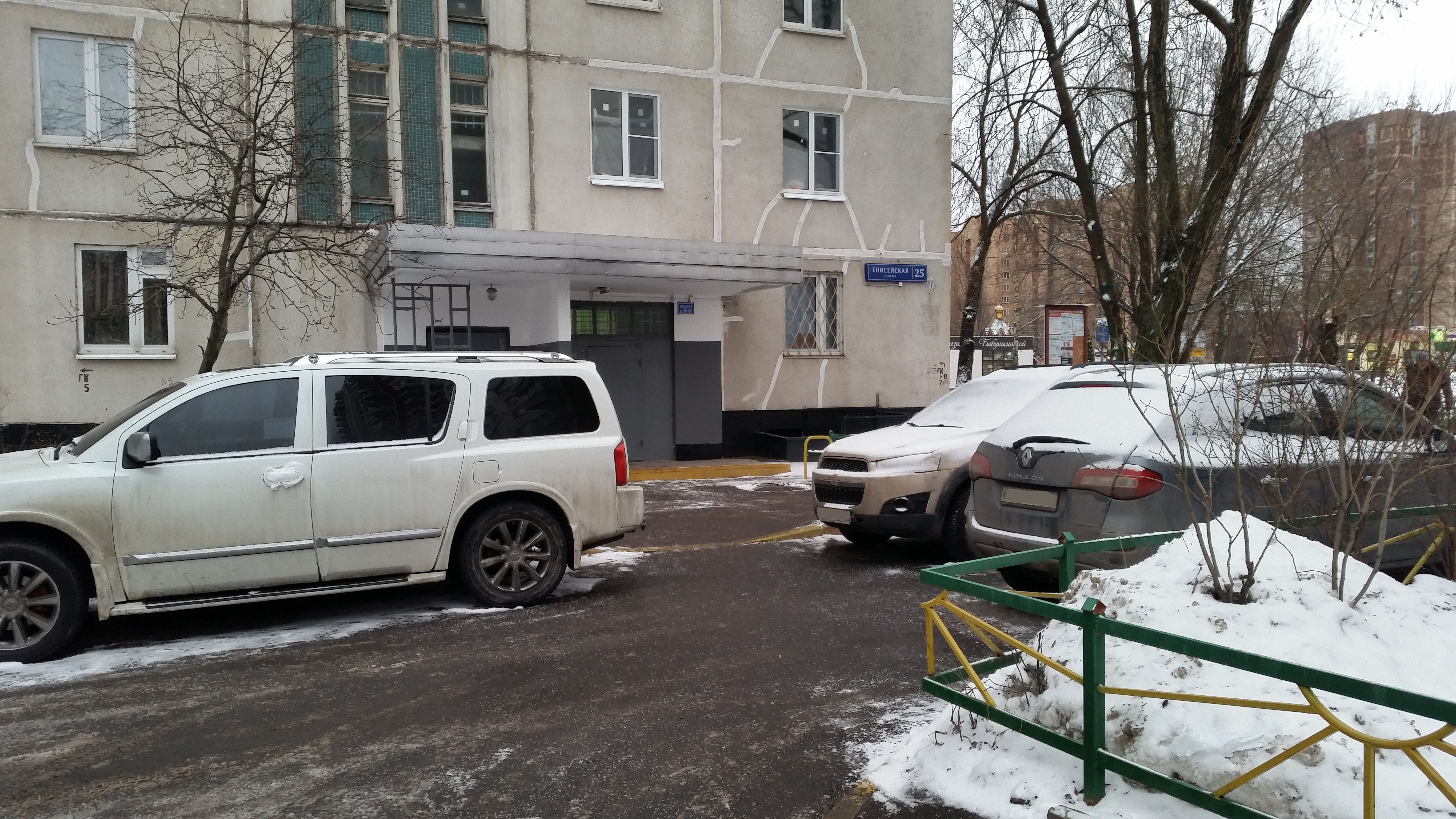 Место съёмок фильма "Вам и не снилось..." 1980 года.